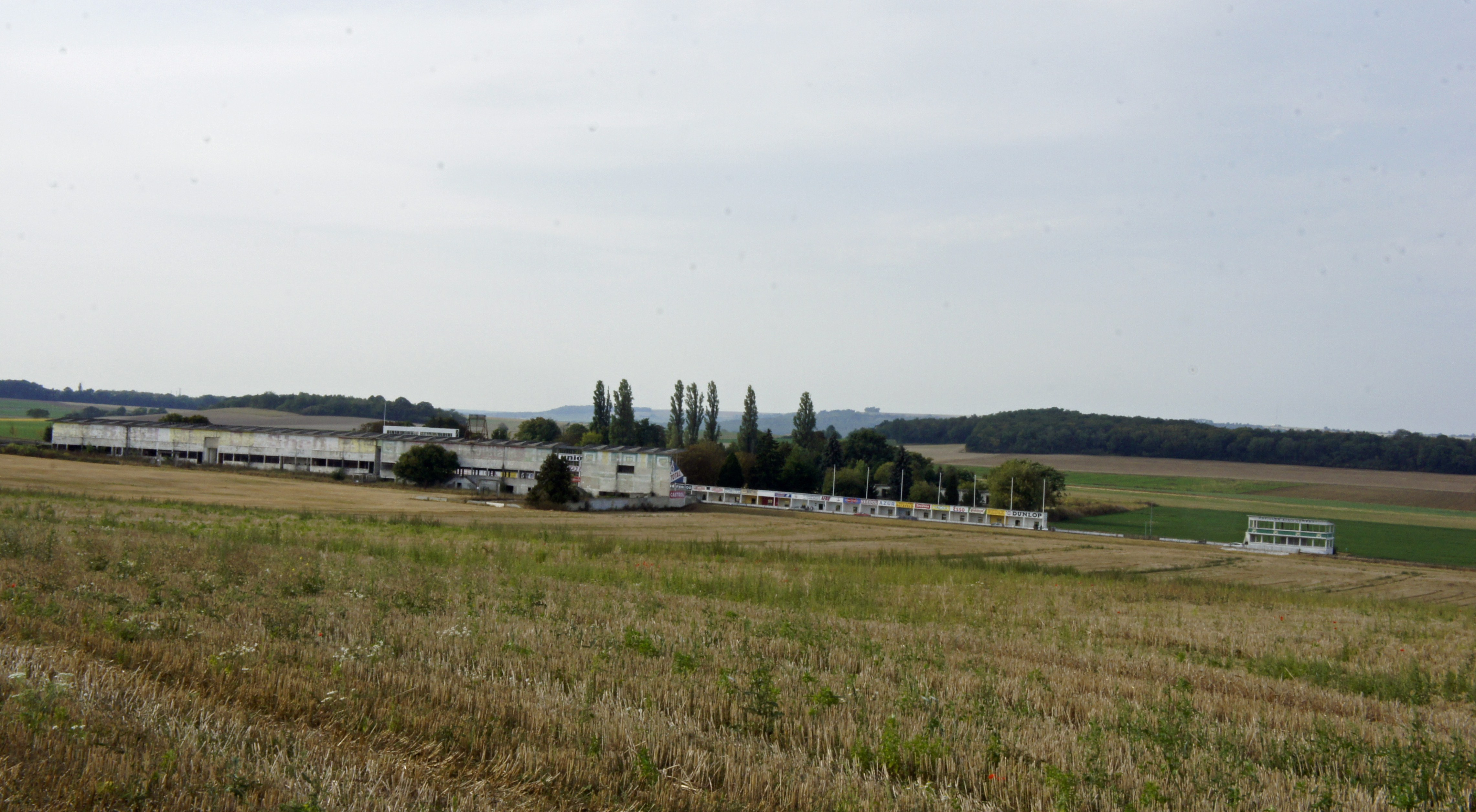 Vue des tribunes du Circuit de Gueux.